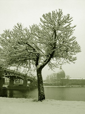 La place Saint-Pierre sous la neige à Toulouse (Haute-Garonne, France).